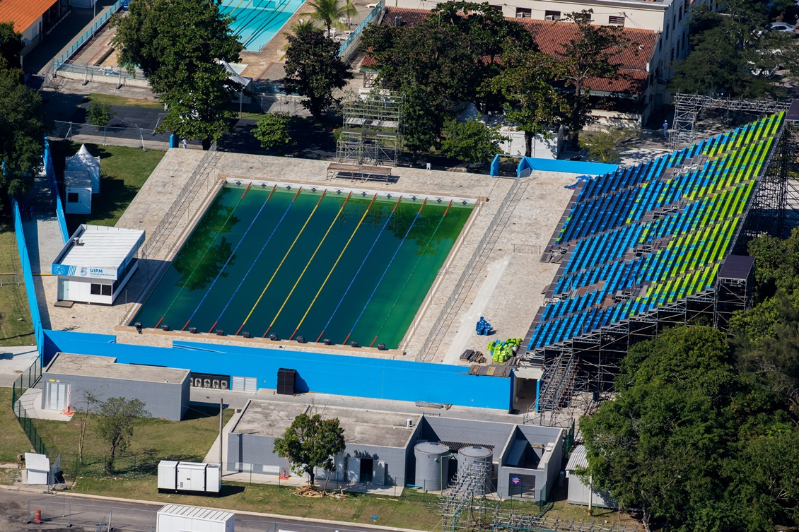 Vista del Centro Aquático de Deodoro di Rio de Janeiro